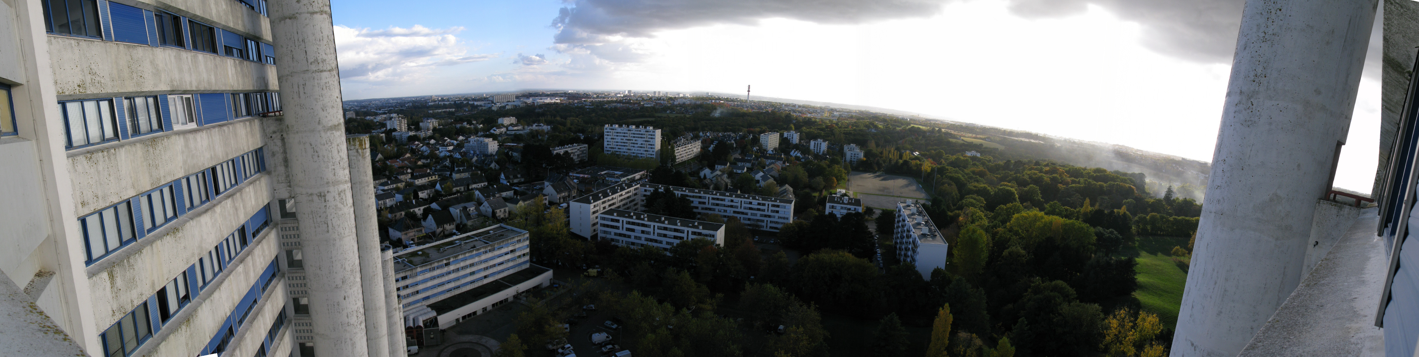 Vue du 22ème étage du sillon de bretagne